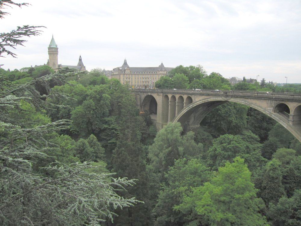 Le pont Adolphe sur la vallée de la Pétrusse